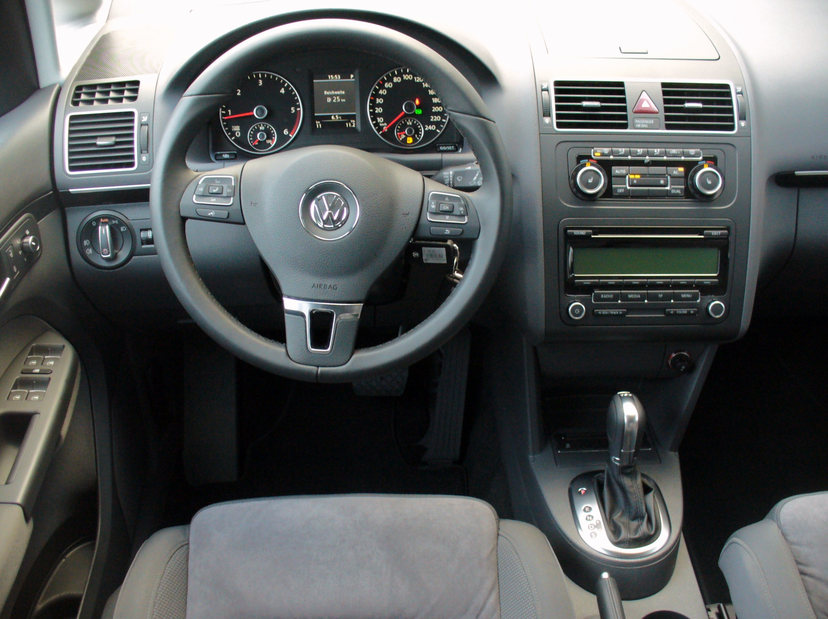 VW Touran